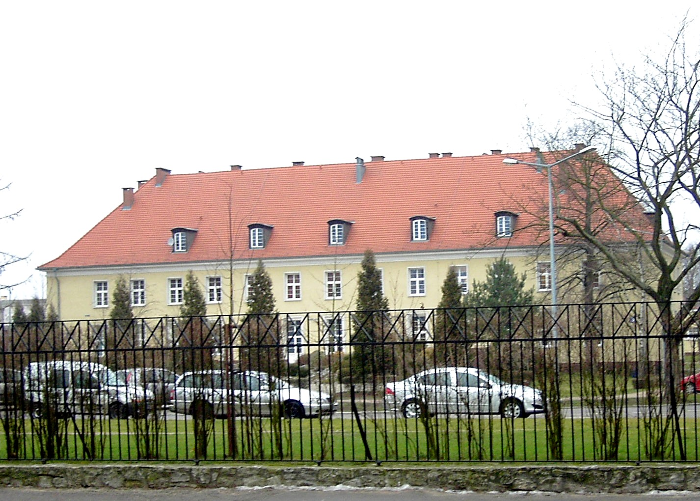 Koszary przy ul. Łukasińskiego w Szczecinie